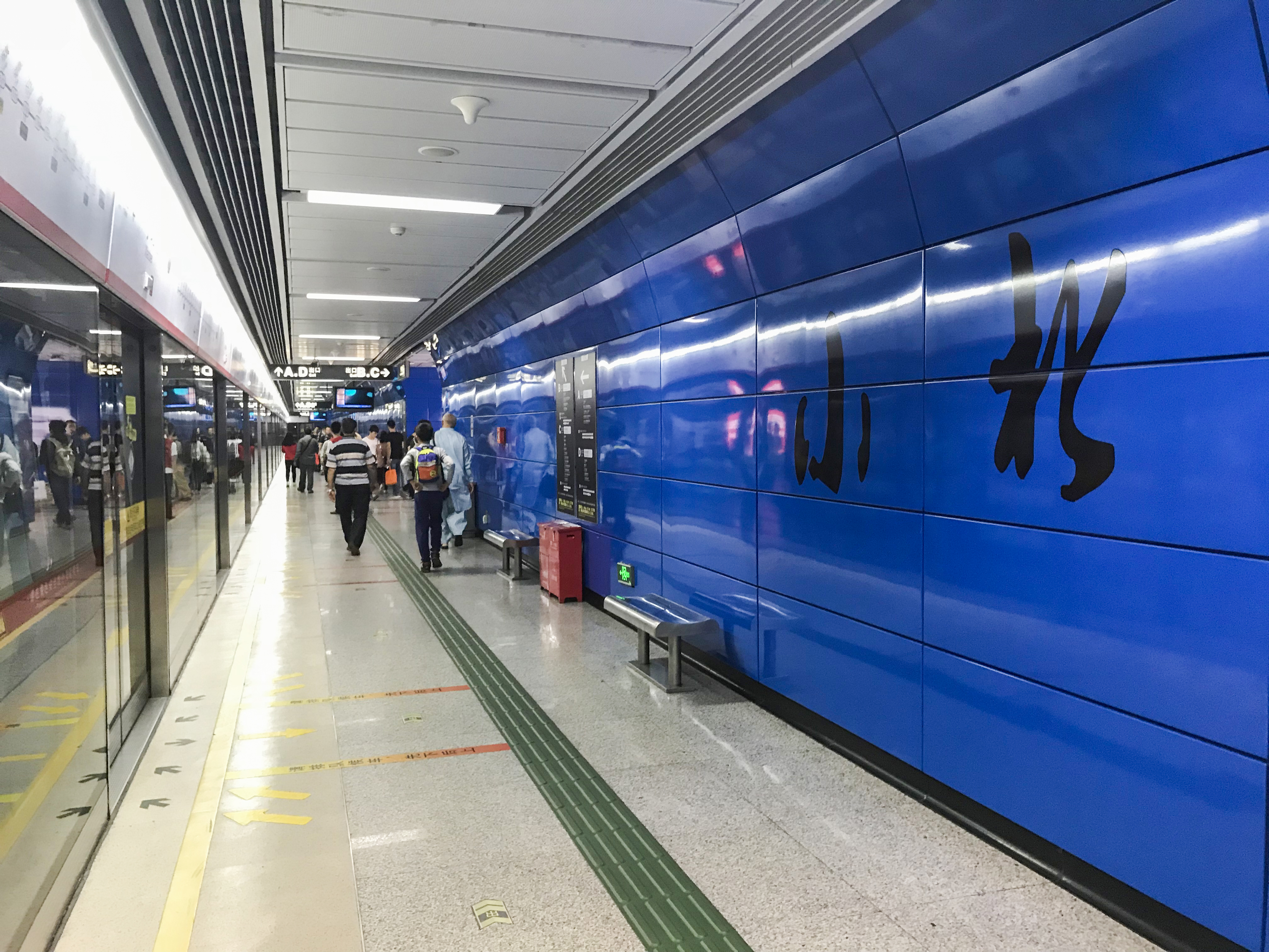 广州地铁小北站